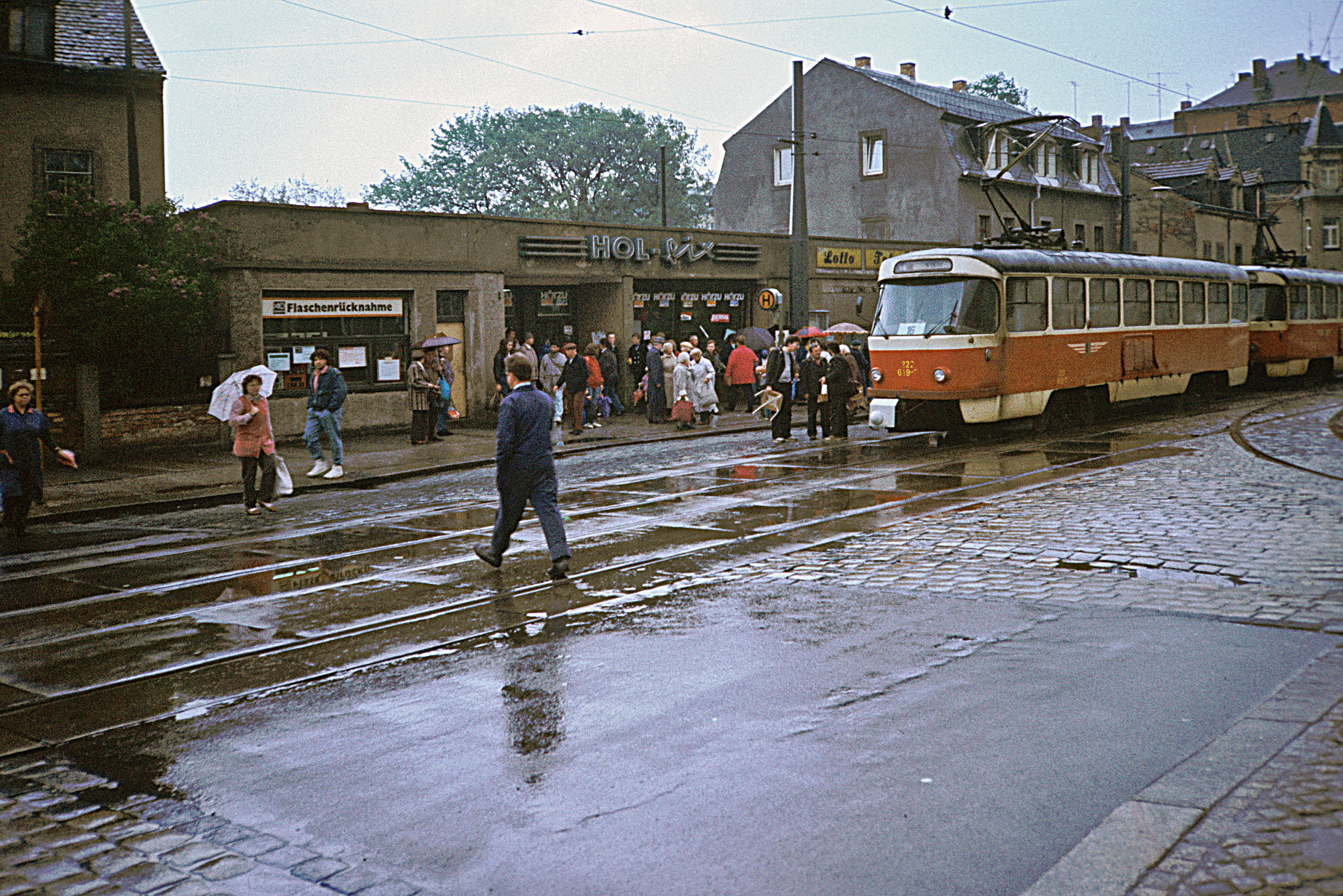 Leipziger Straße gegenüber vom Straßenbahnhof Mickten, 1990, Straßenbahnlinie 16 , HOL-fix